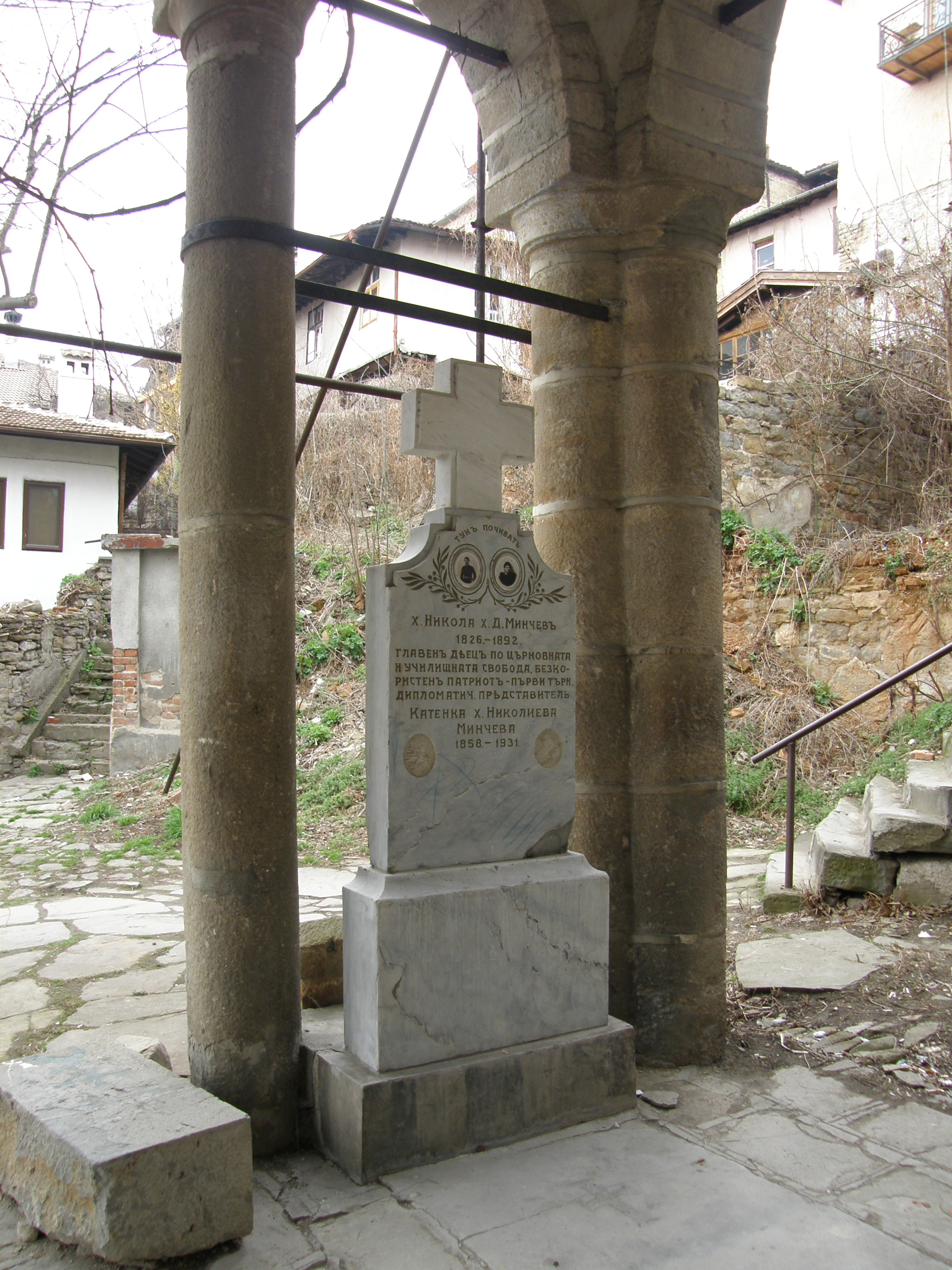 Св.св. Константин и Елена В.Търново